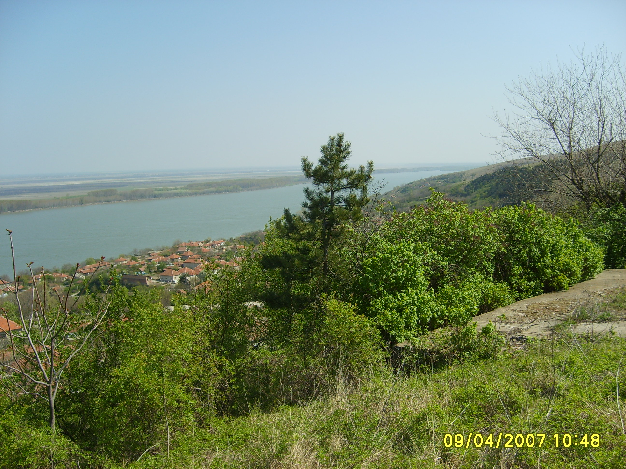 Изглед към Горни Вадин